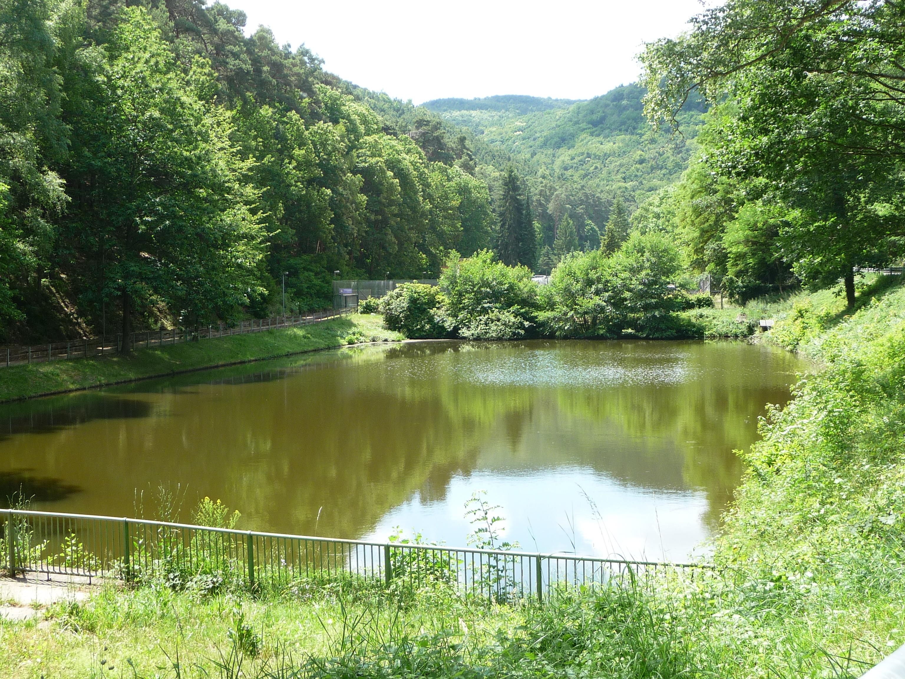 Burgtal in Wachenheim, Rheinland-Pfalz